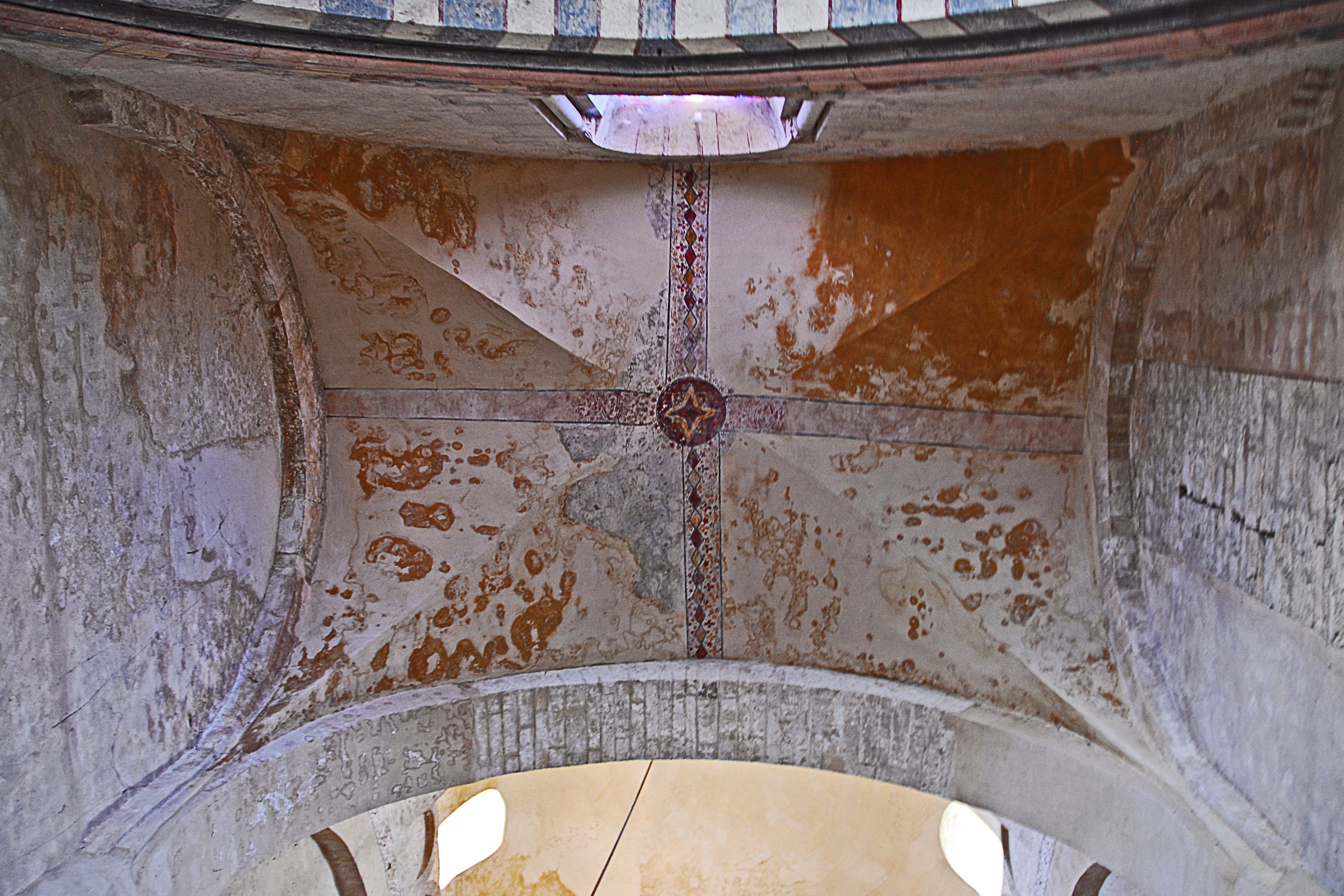 St-Martin_de_Chapaize, Gewölbe Chorjochmitte